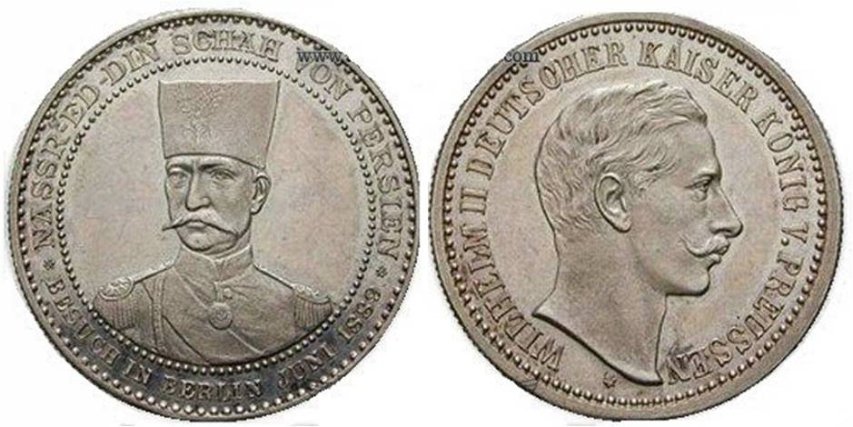 مدال نقره یادبود سفر ناصرالدین شاه به آلمان با تصویر ناصرالدین شاه در یک طرف مدال و تصویر ویلهلم دوم در طرف دیگر